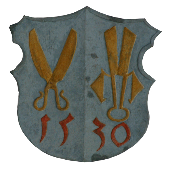 Alianční znak cechu krejčích postřihačů umístěný v kostele Nanebevzetí P. Marie v Mostě